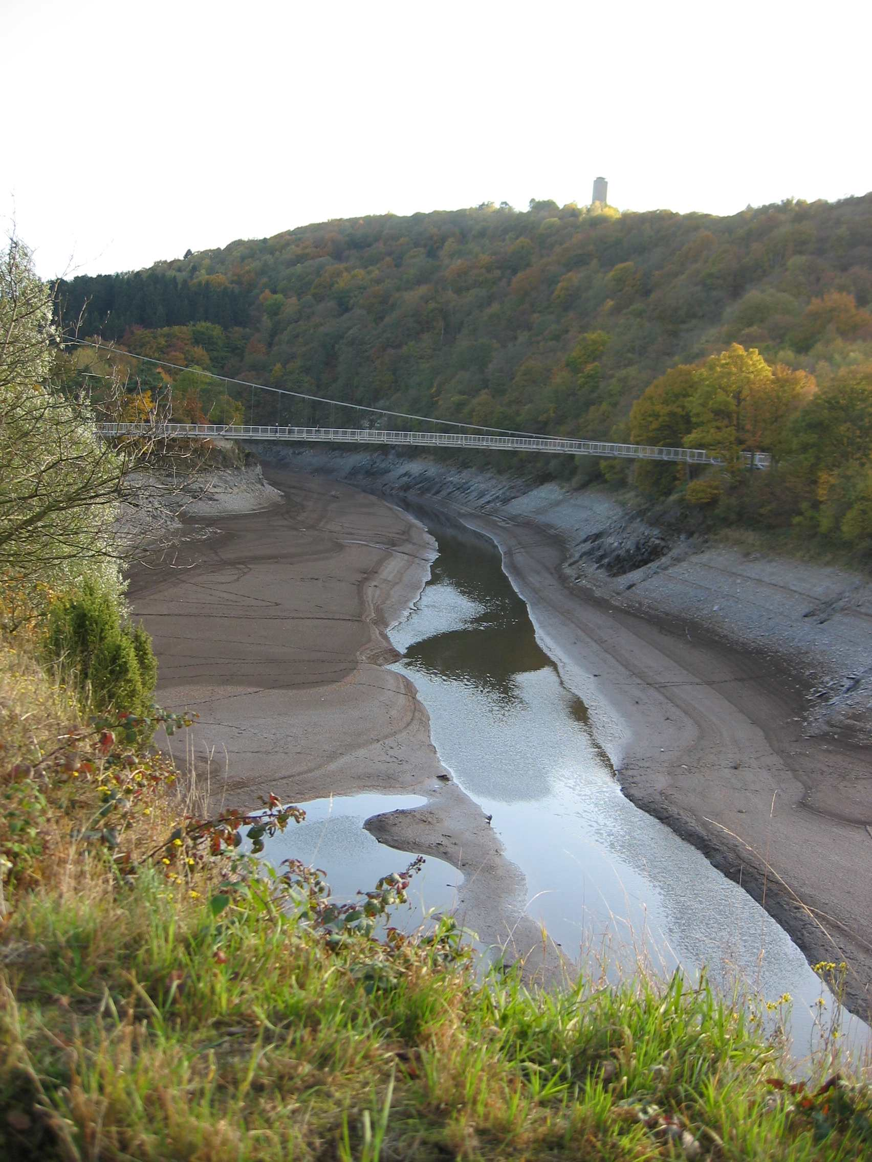 Victor-Neels-Brücke über die Urft/Urftstausee unterhalb der Burg Vogelsang